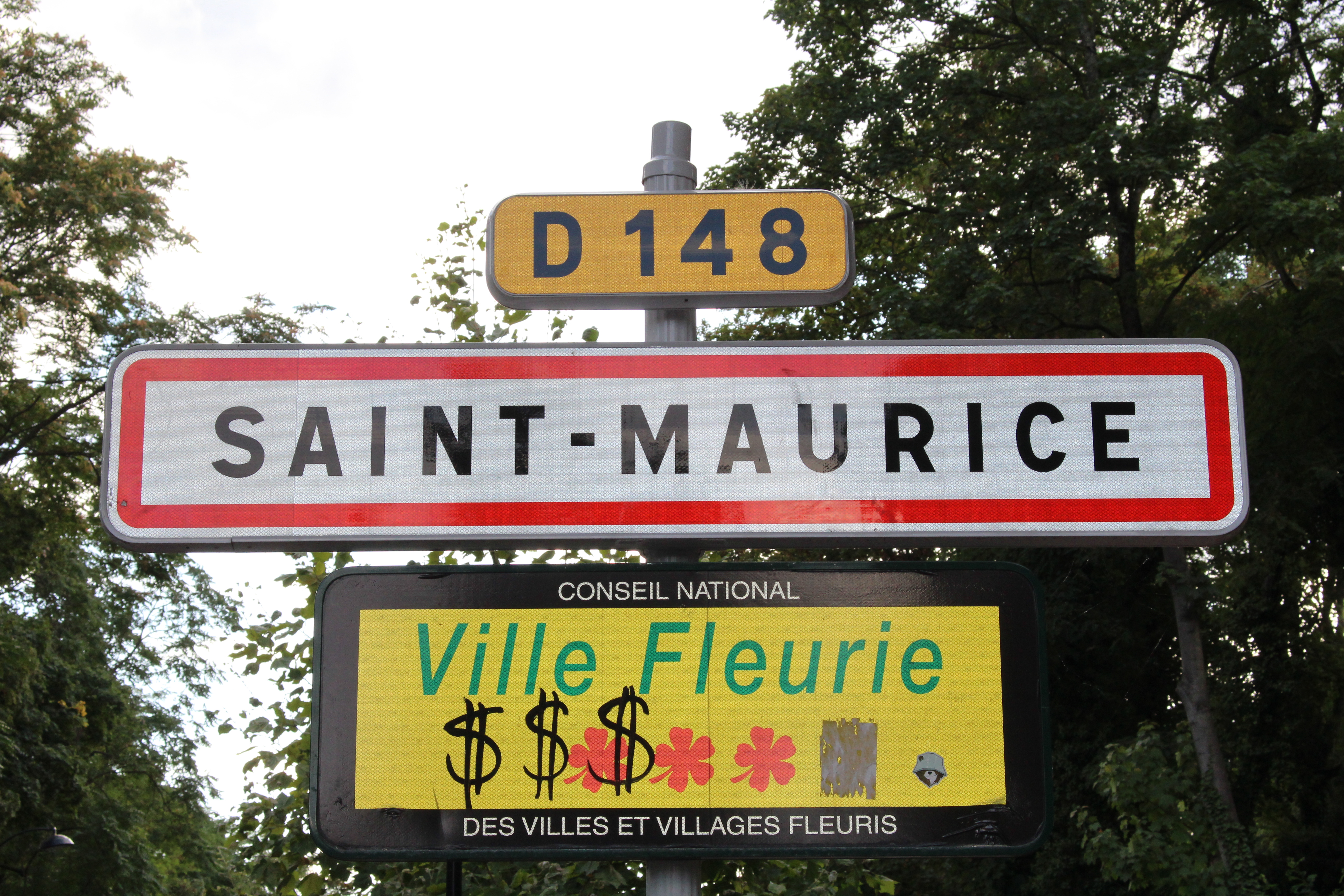 Panneau d'entrée dans Saint-Maurice dans le Val-de-Marne depuis le centre de Joinville-le-Pont.